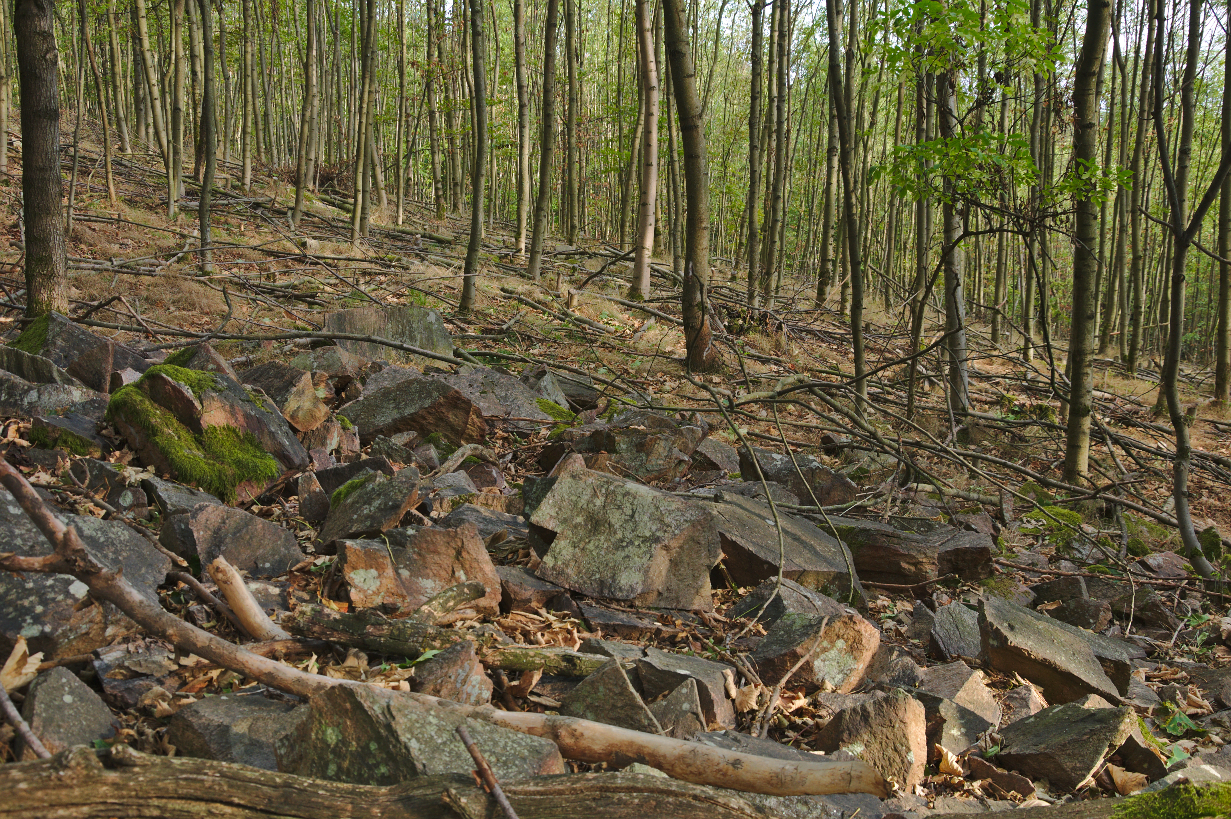 Přírodní památka Míchovec, okres Brno-venkov